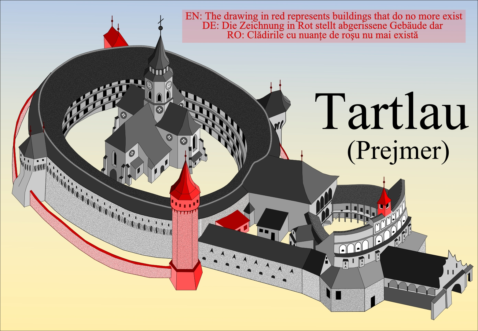 Biserica fortificata din Prejmer v1